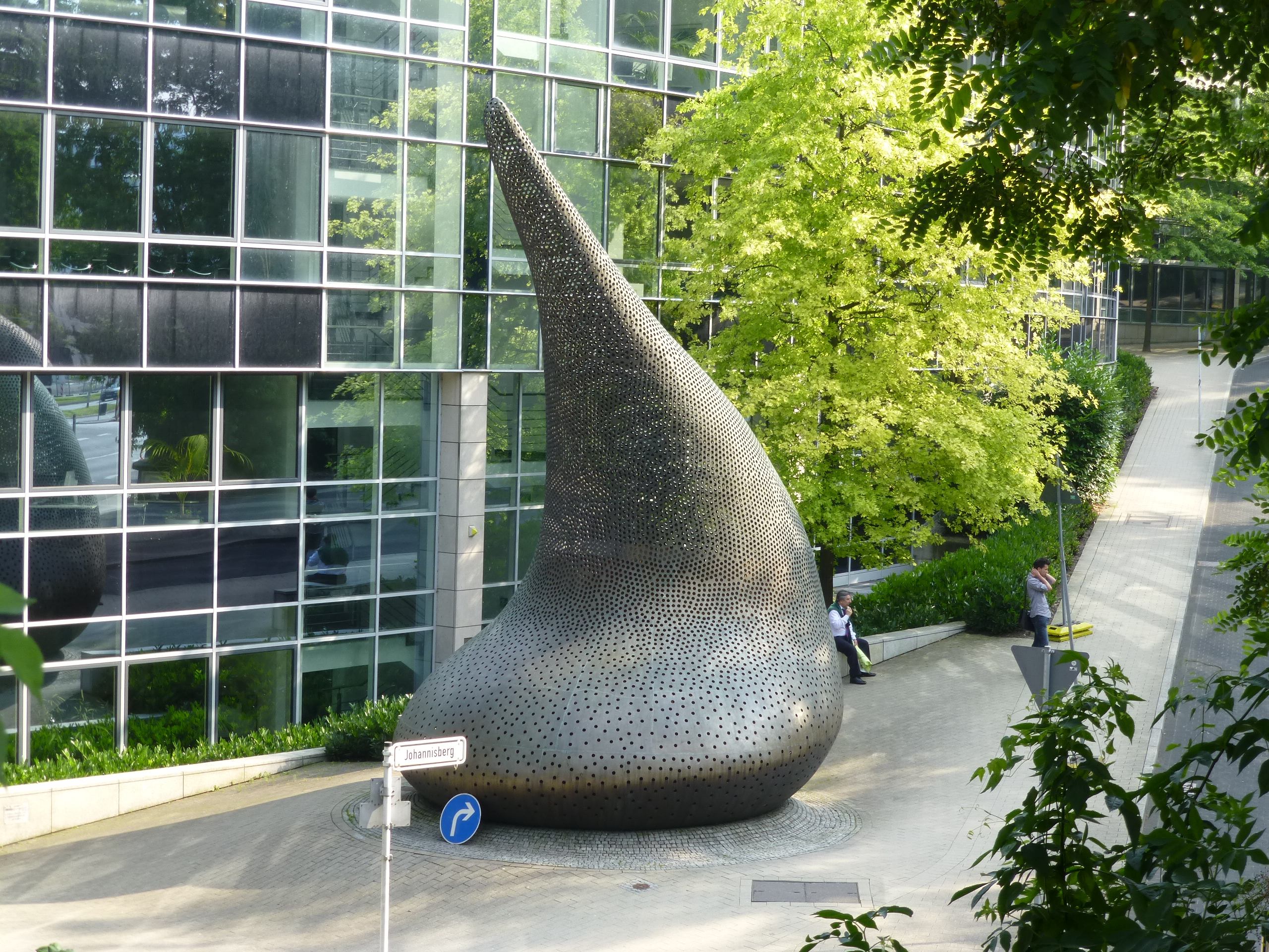 Immermannstraße, Wuppertal